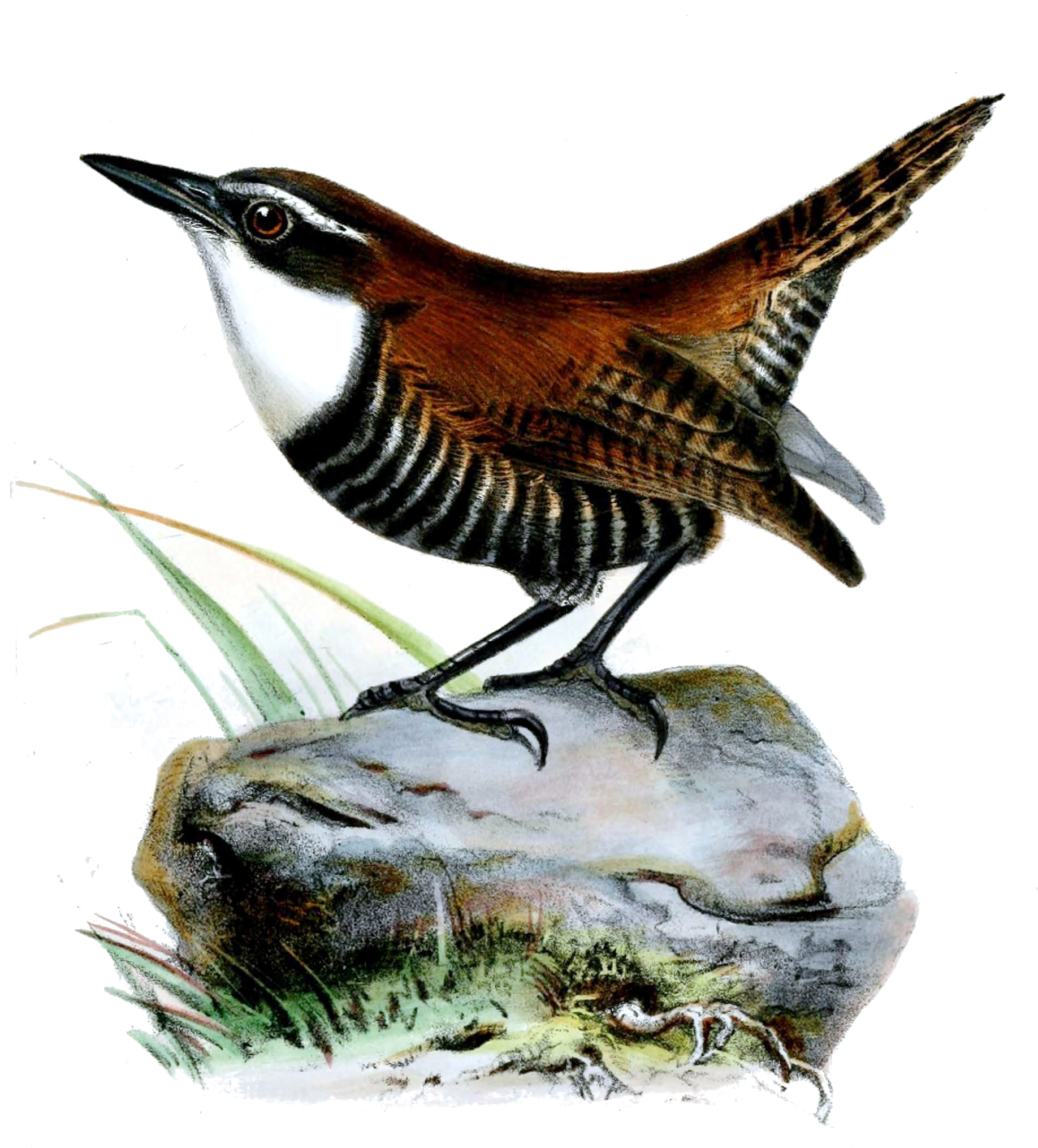 Cyphorinus albigularis= Microcerculus bambla